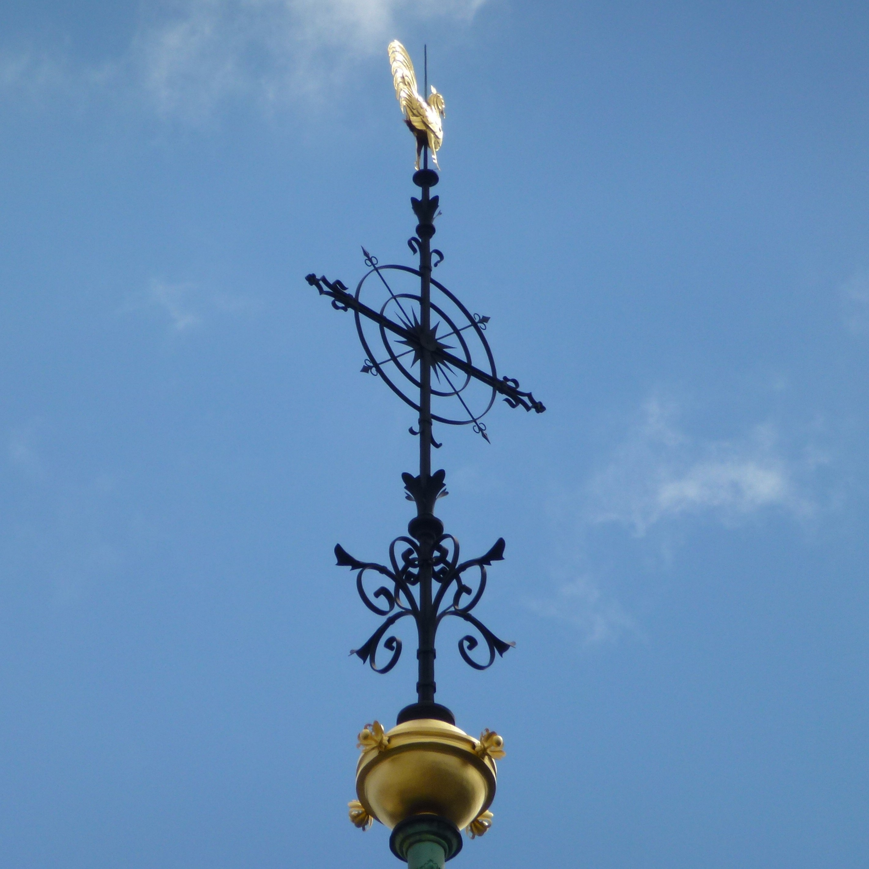 Klara kyrka spiran